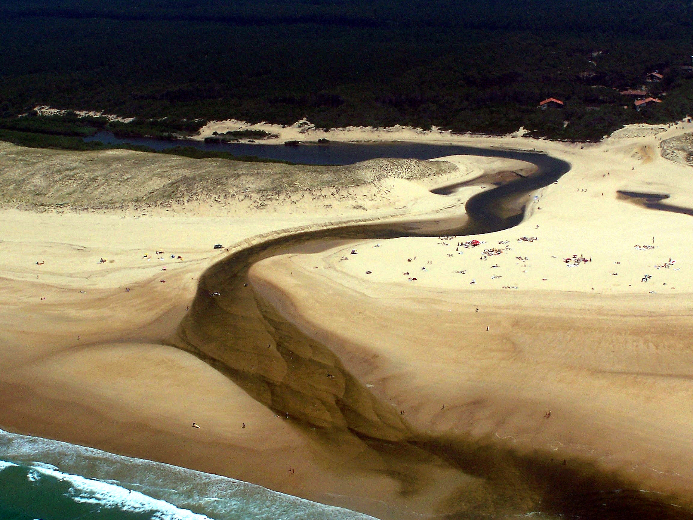 Le courant d'Huchet (Landes, France) pris d'avion. Photo prise par Chocho, téléchargée par Jibi44